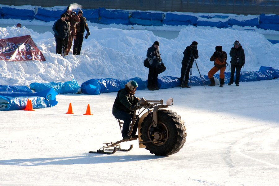 Один из вариантов унимото. Двигатель находится внутри колеса от грузовика. Мотоциклетный слёт SNOWDOGS-2012. Чемпионат мира по унимото. Тольятти. 2012